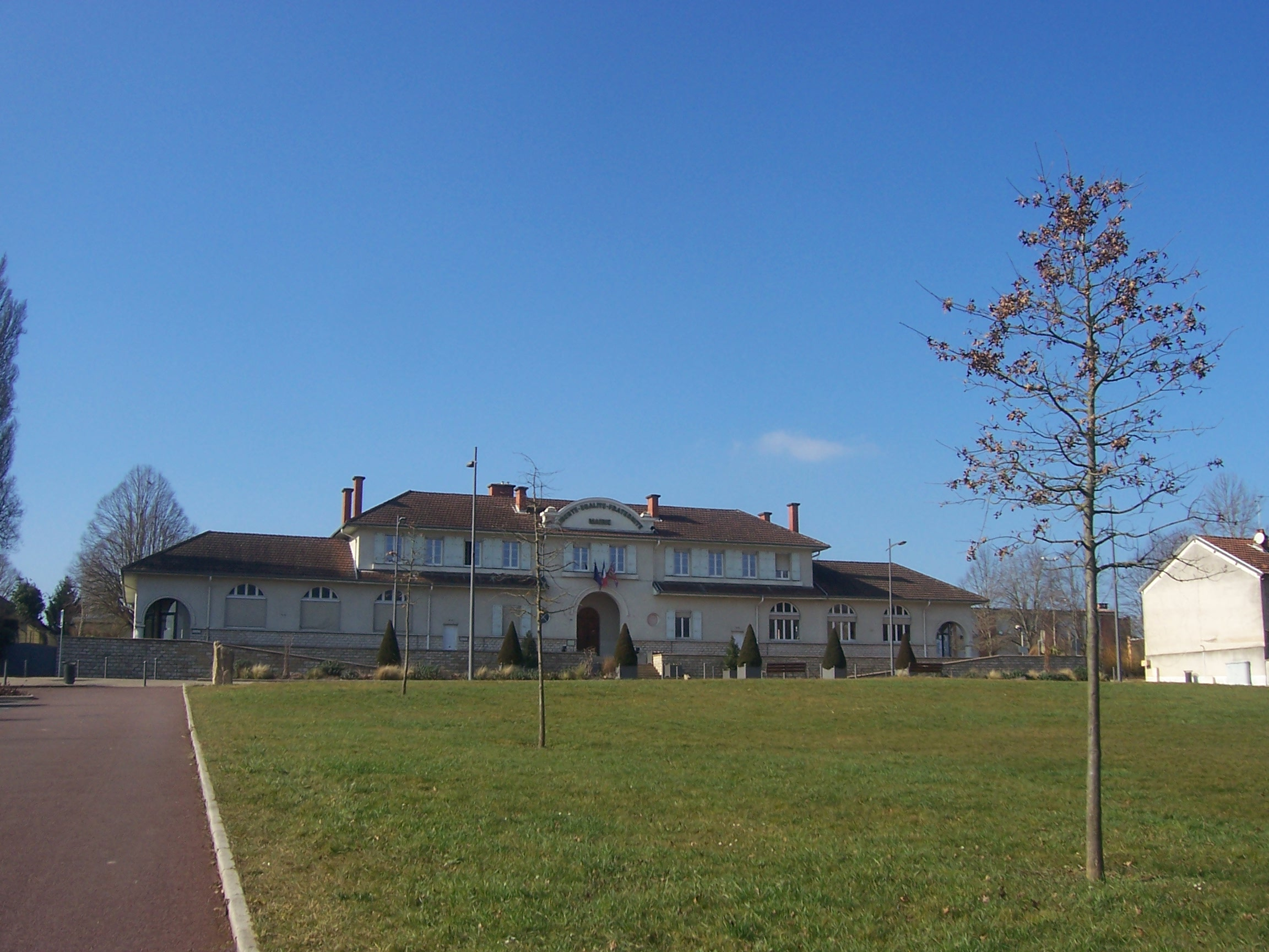 Maire de Châtenoy-le-Royal